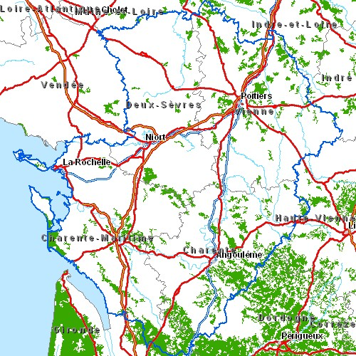 Carte routière de la région Poitou-Charentes Légende